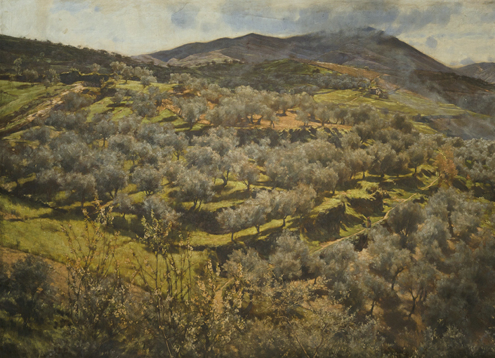 detail